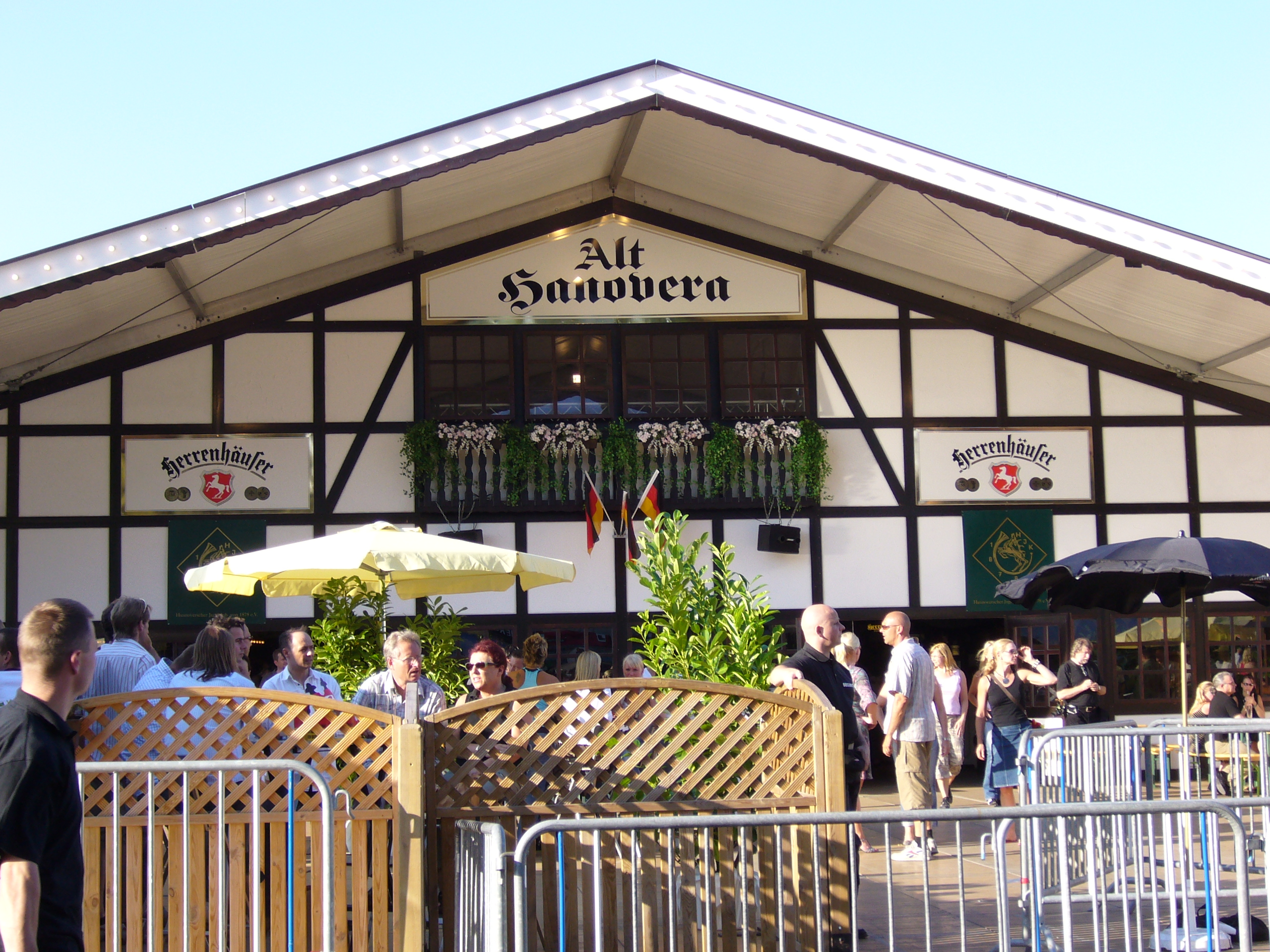 Festhalle "Alt Hanovera" auf dem Schützenfest Hannover, HAJ, Selbst photographiert